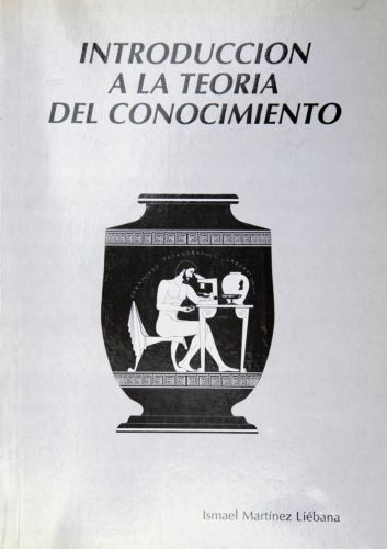 Libro de Mrtínez-Liéban